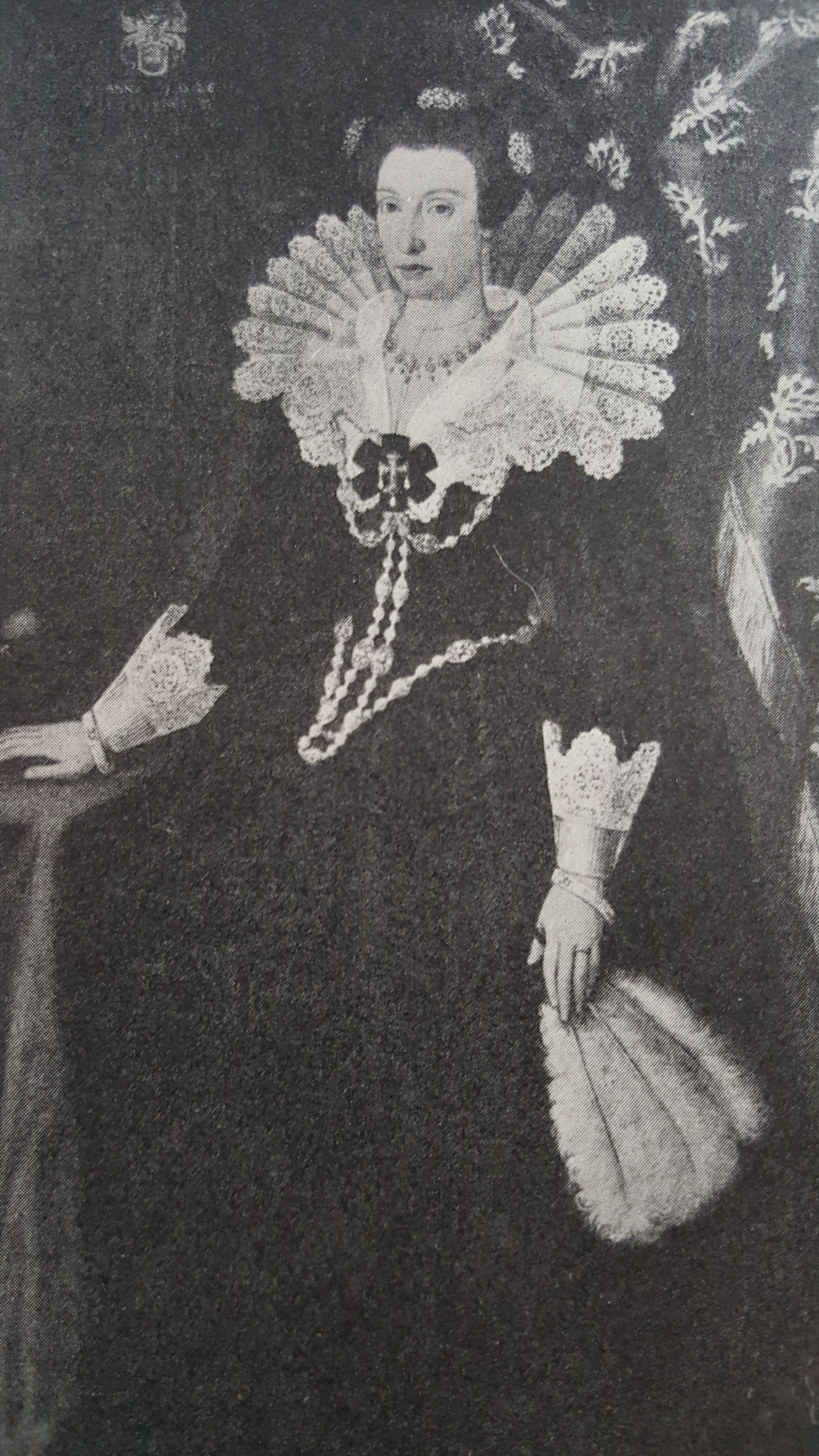 Anna Bååt, född 1579, död 1649. Gift med Axel Oxenstierna 1608.